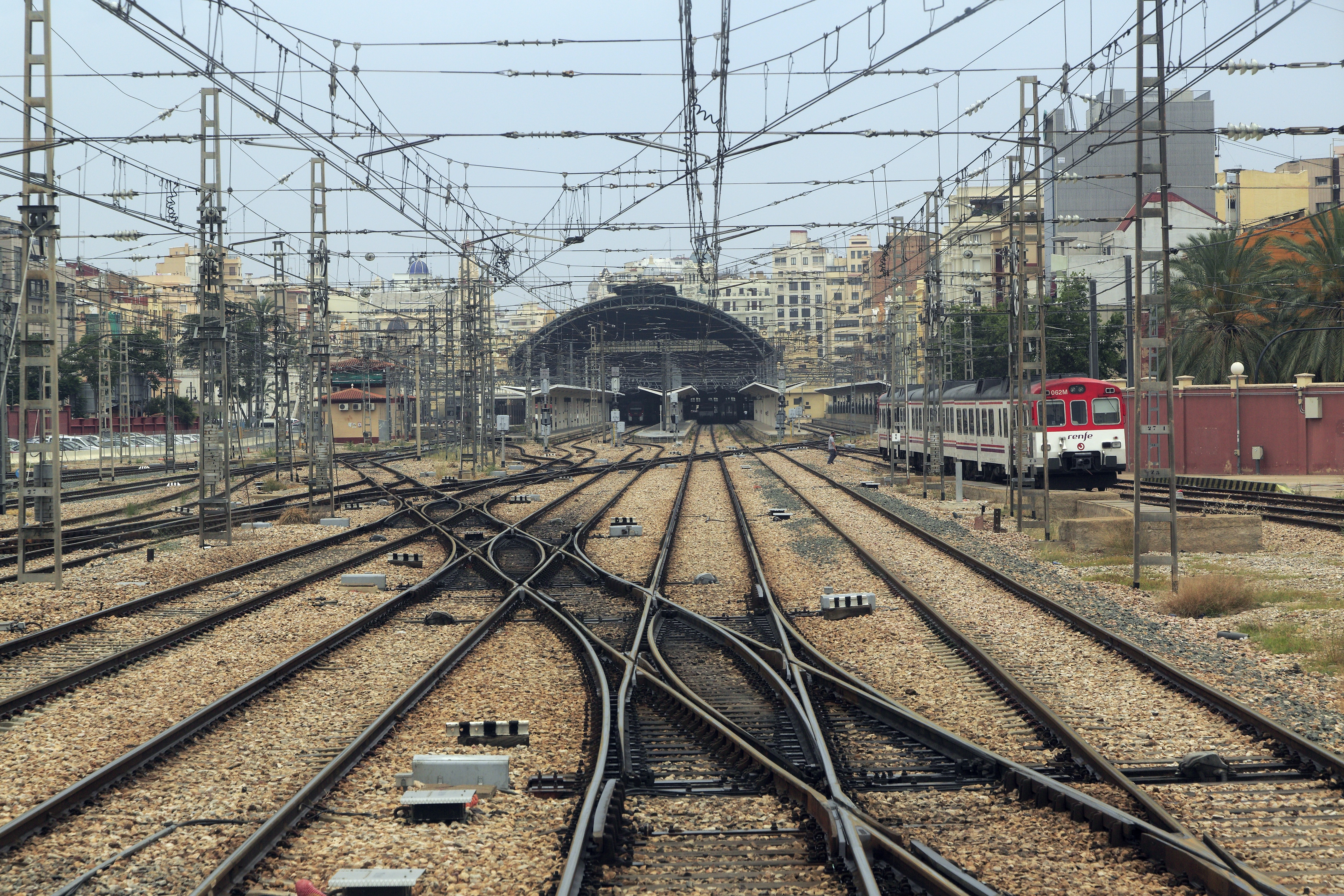 Vor der Bahnsteighalle liegen zwei Weichenstraßen aus doppelten Kreuzungsweichen, die Fahrten aus jeder in jede Richtung ermöglichen. Sämtliche Gleise im Bf Valencia Nord sind breitspurig.